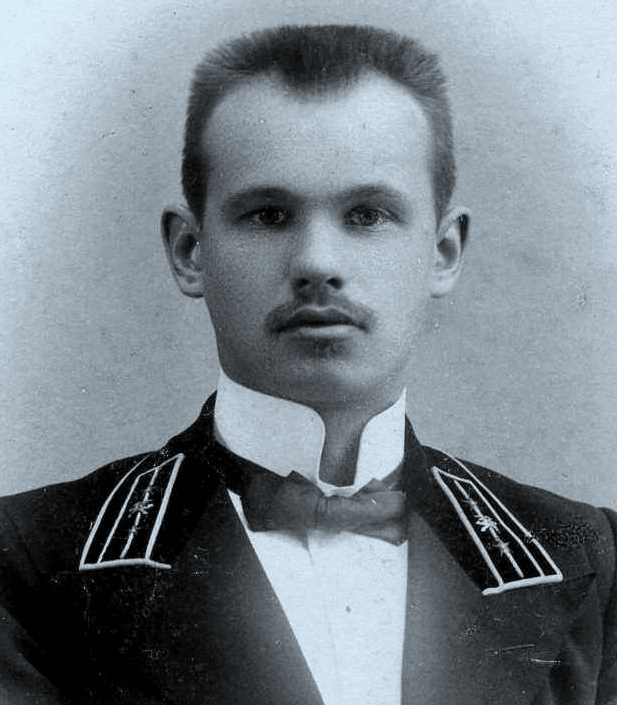 Неизвестный в чине губернского секретаря